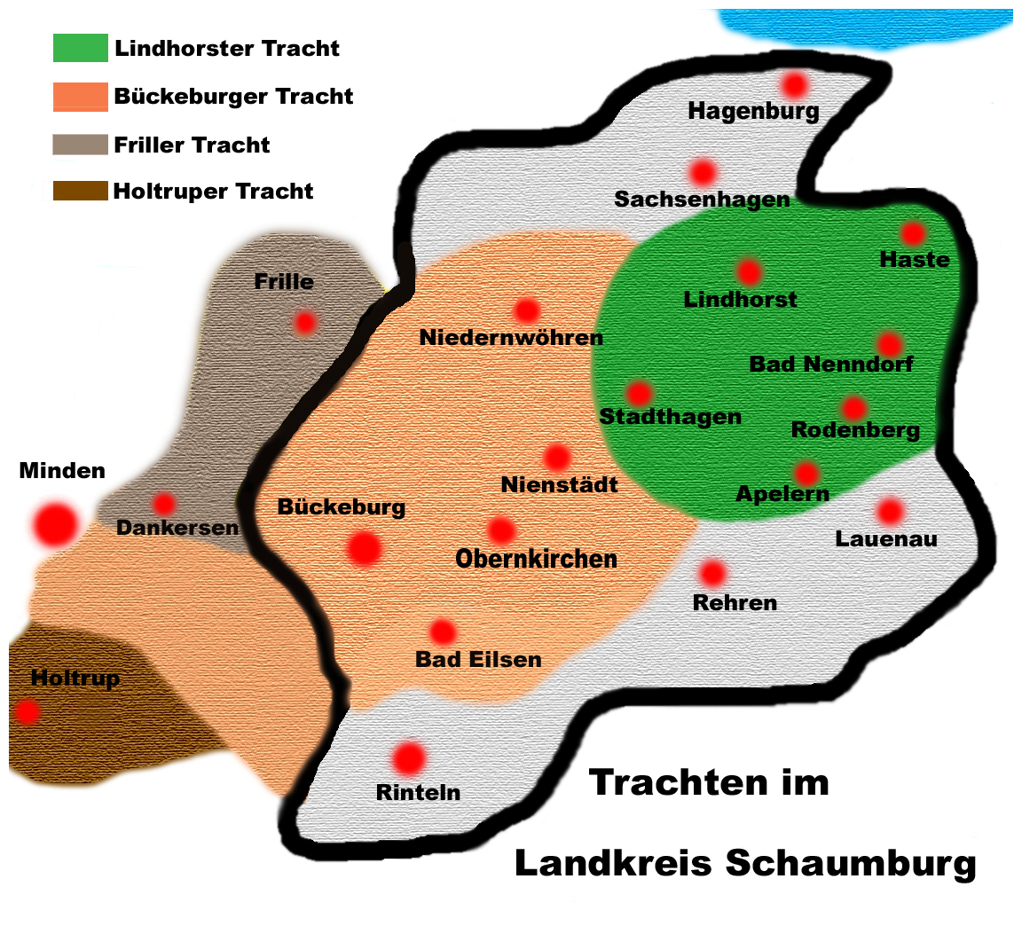 Verbreitungsregionen der Schaumburger Tracht. Variationen im Landkreis Schaumburg.